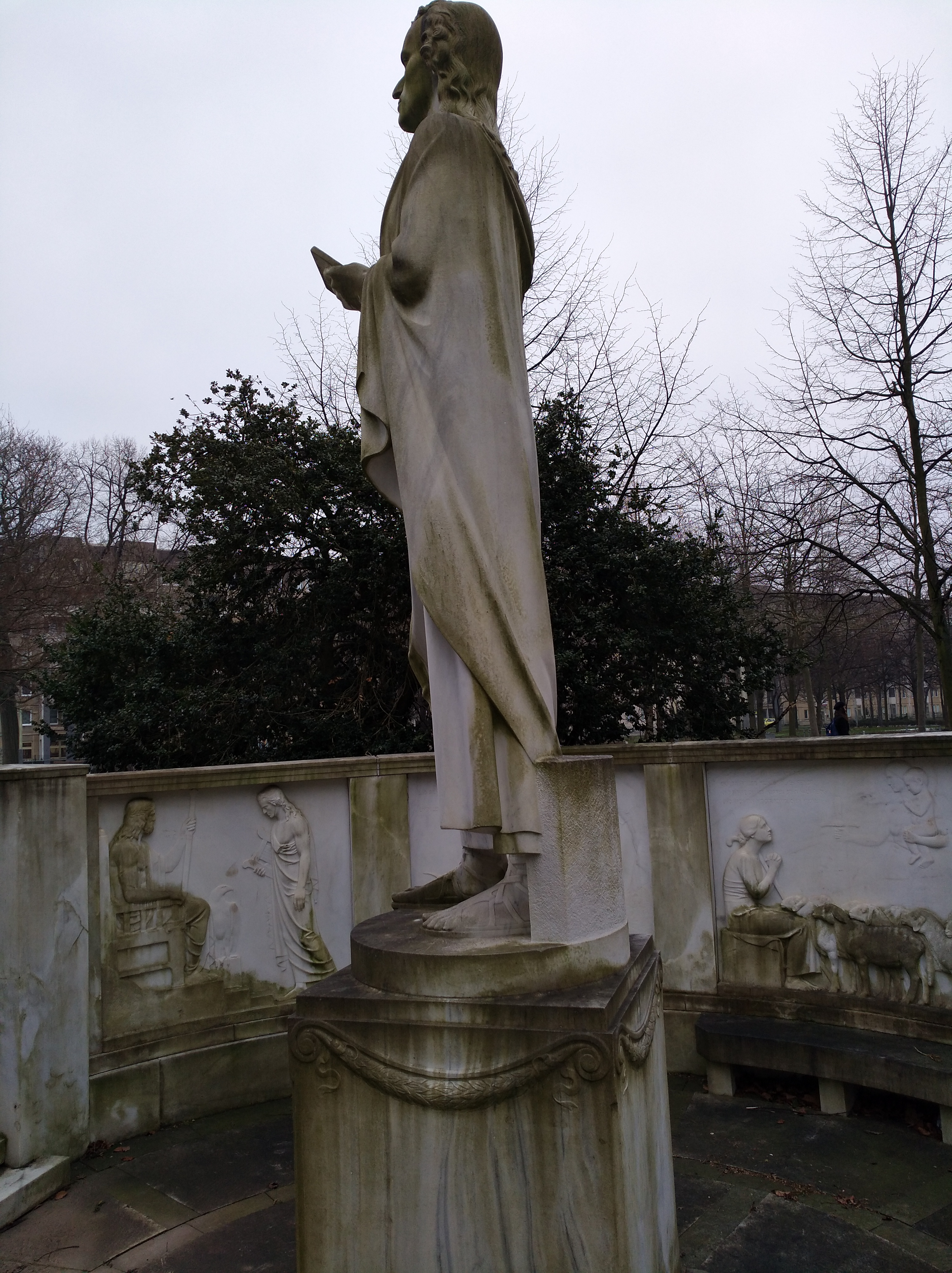 Reliefs im Schillerdenkmal Dresden, Zustand Februar 2018